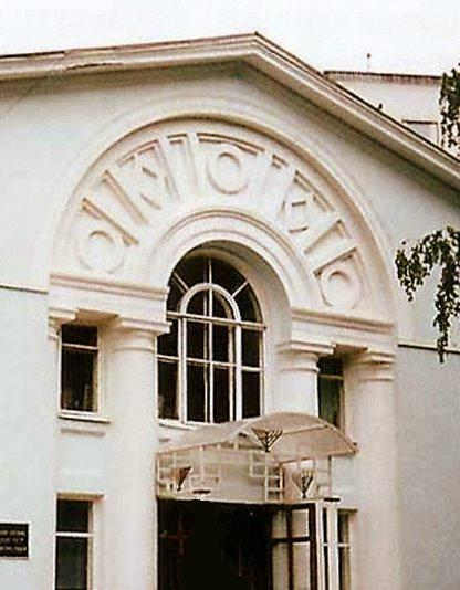 Синагога на Большой Бронной улице Москва